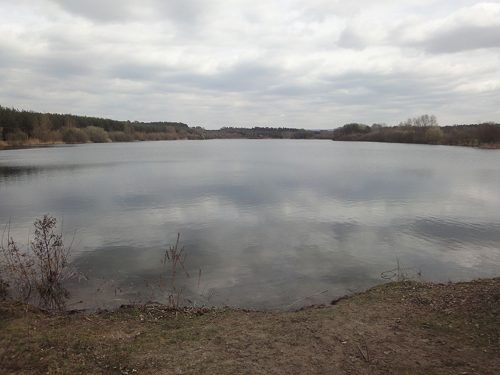 Sennesee bei Stukenbrock-Senne, Blickrichtung Ost